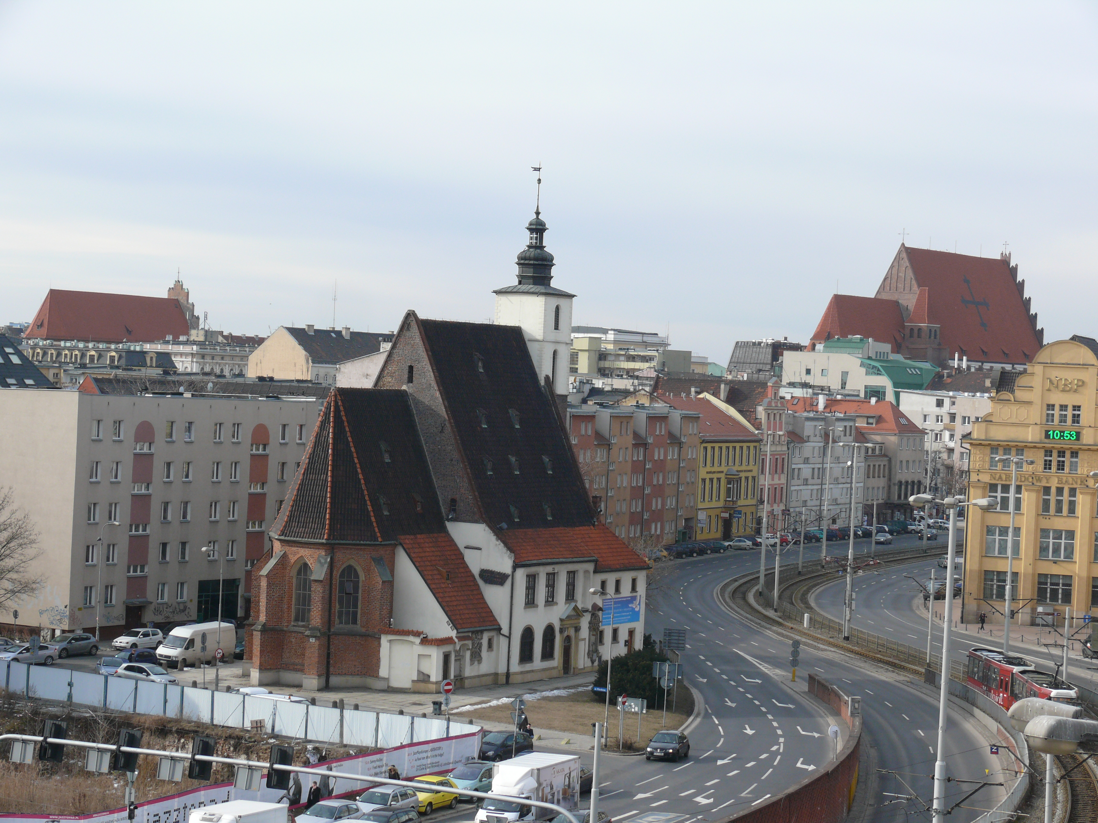 Kościół św. Krzysztofa